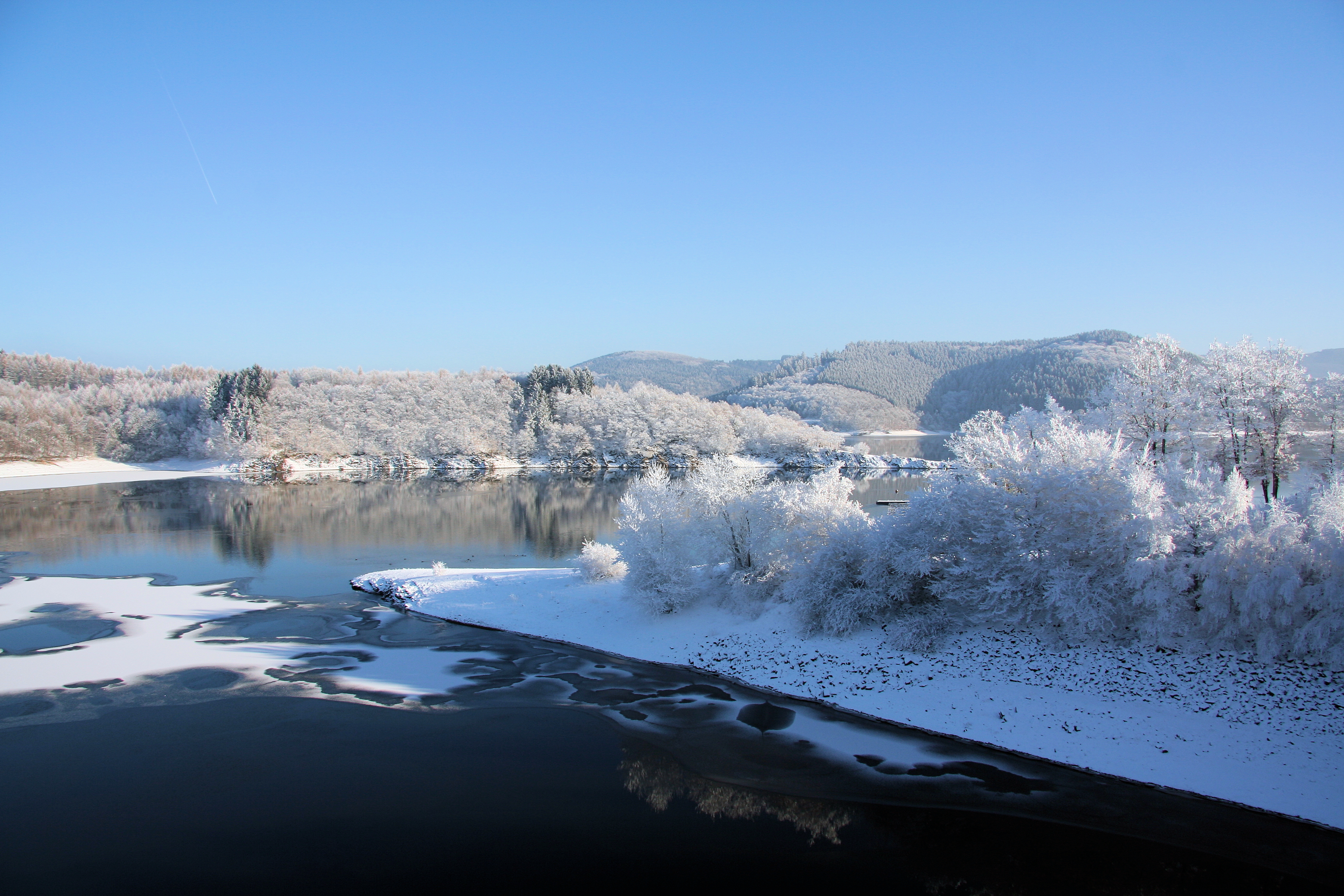 Winterliche Stimmung am Biggesee